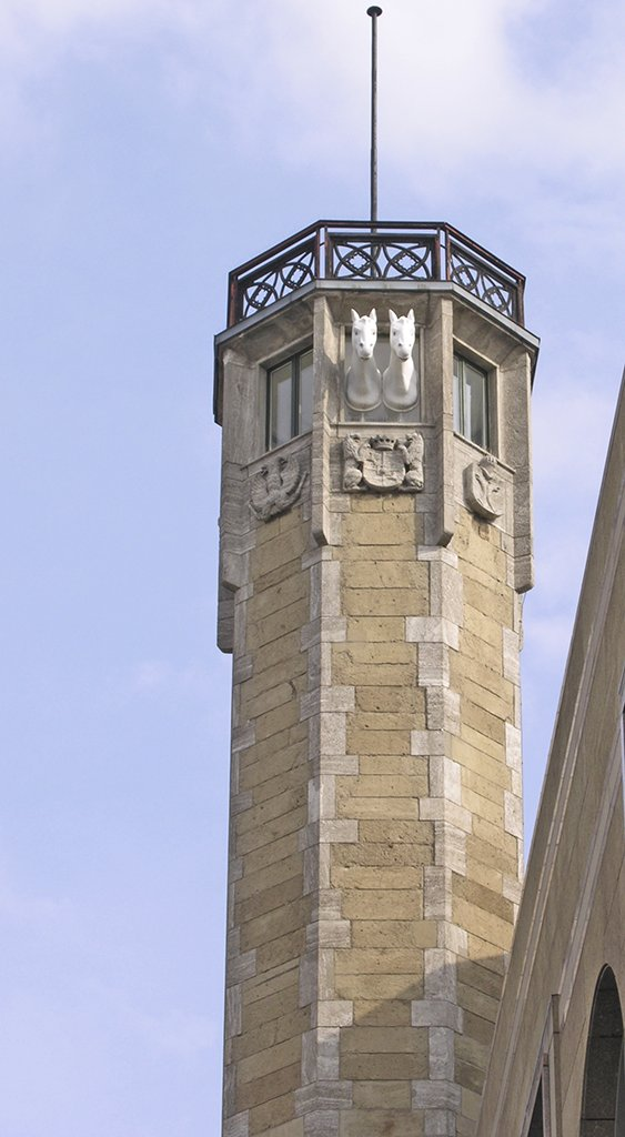 Köln, Richmodisturm am Neumarkt (Richmodstraße)